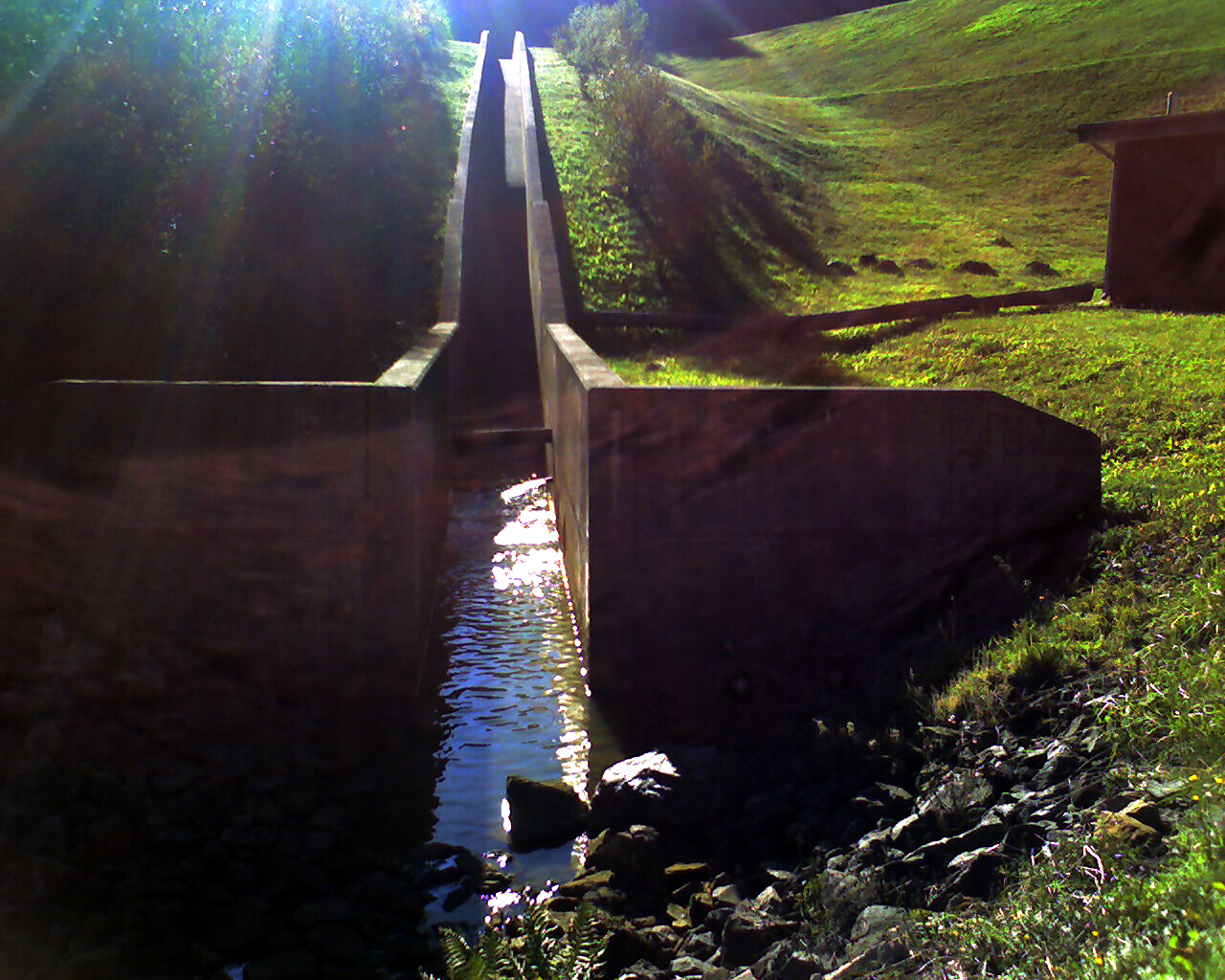 Abfluß in den Rieschengraben (Rödelbachgraben)Seitwärts rechts mündet der Grundablaß, von oben kommt der Überlauf (also nur wassergefüllt bei Vollstau - vorher fließt die Vorsperre in den Frankenteich ab).